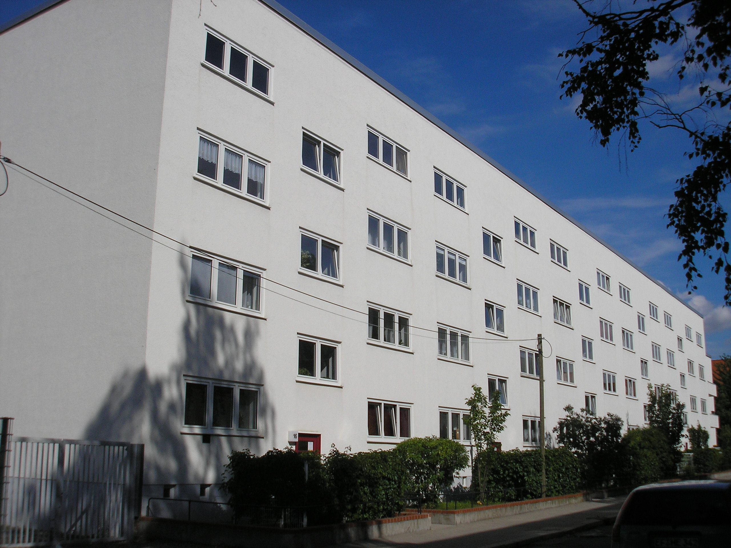 Teil der Wohnanlage Hansablock von 1930 auf der Nordseite der Dortmunder Straße in Erfurt.